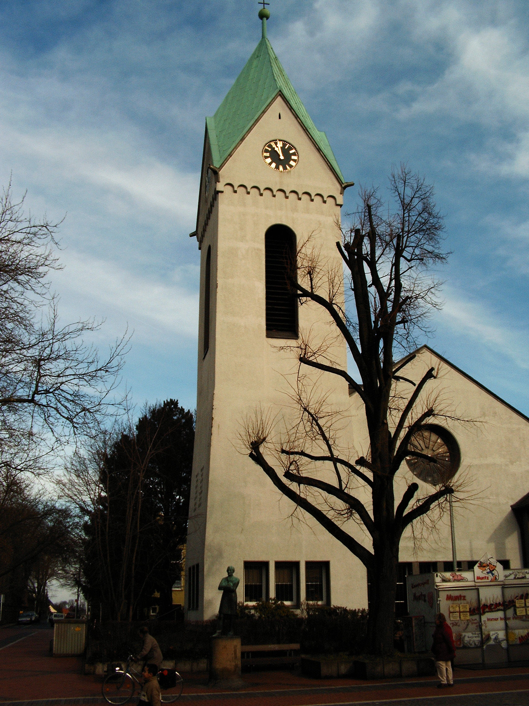 Dortmund-Hombruch: evangelische Kirche am Markt